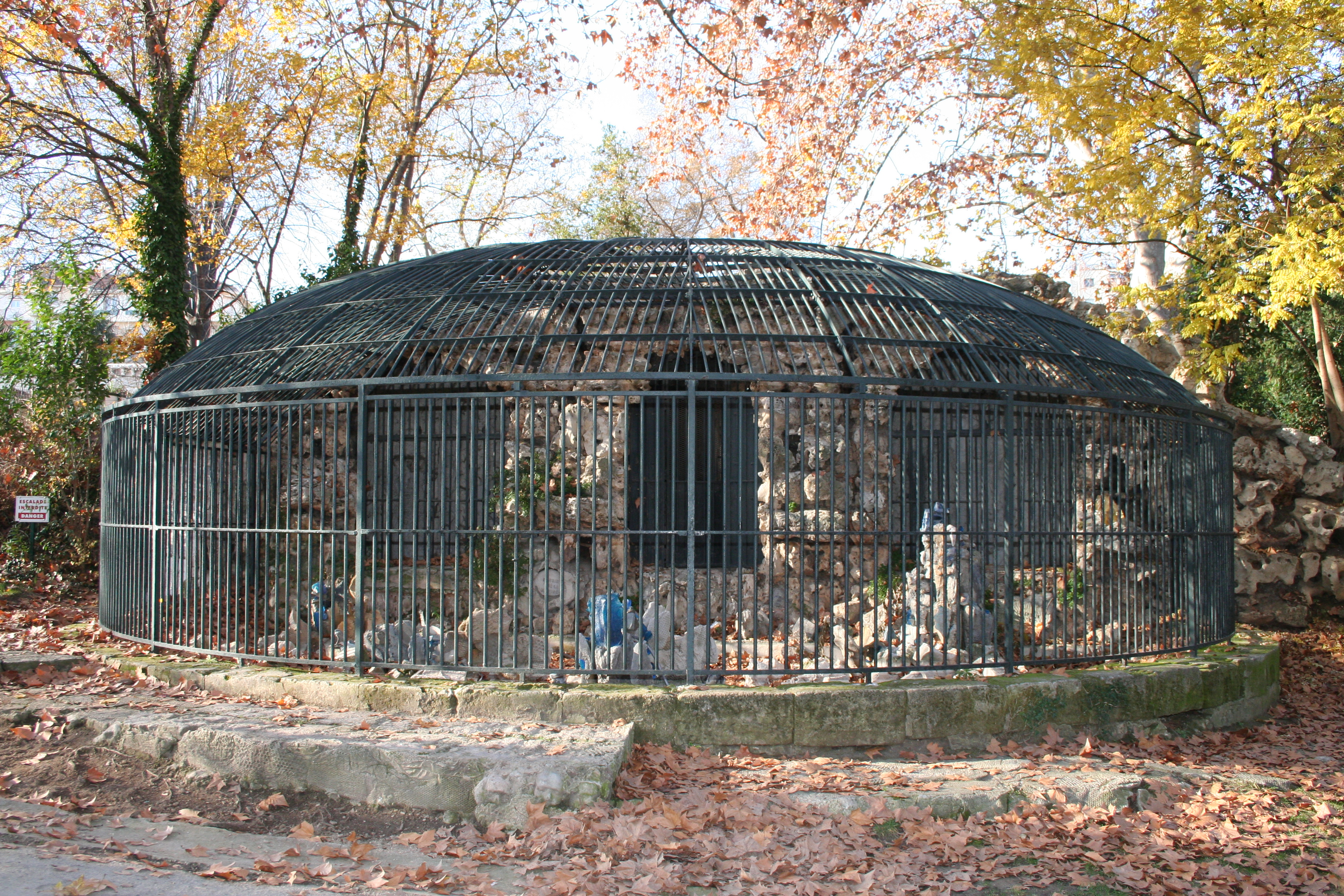 L'ancienne cage aux ours du Jardin zoologique. Palais Longchamp, Marseille (France)